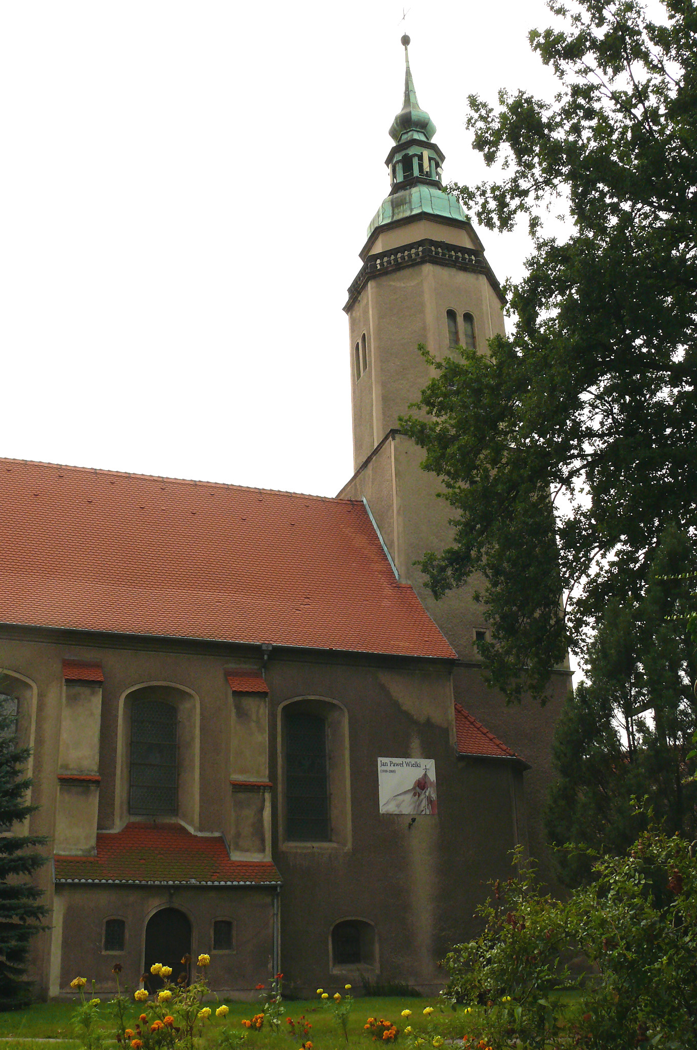 Sulików, ul. Kościelna - kościół parafialny Podwyższenia Krzyża Świętego (zabytek nr rejestr. 1501 z 25.01.1966)